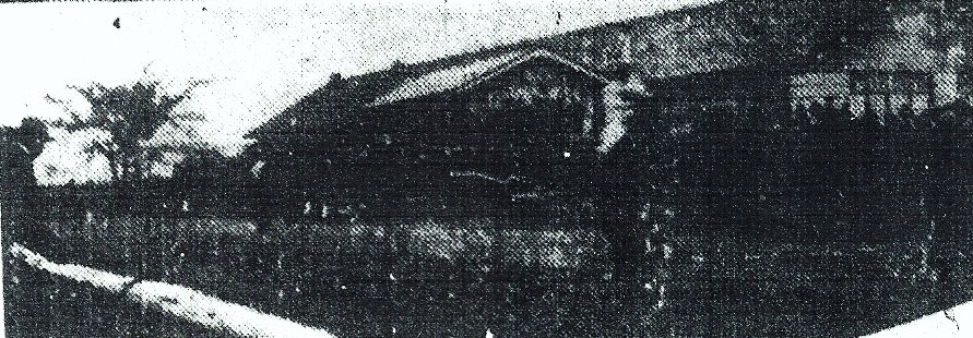 昭和9年4月30日に宮城県若柳町で行われた花競馬の光景です。